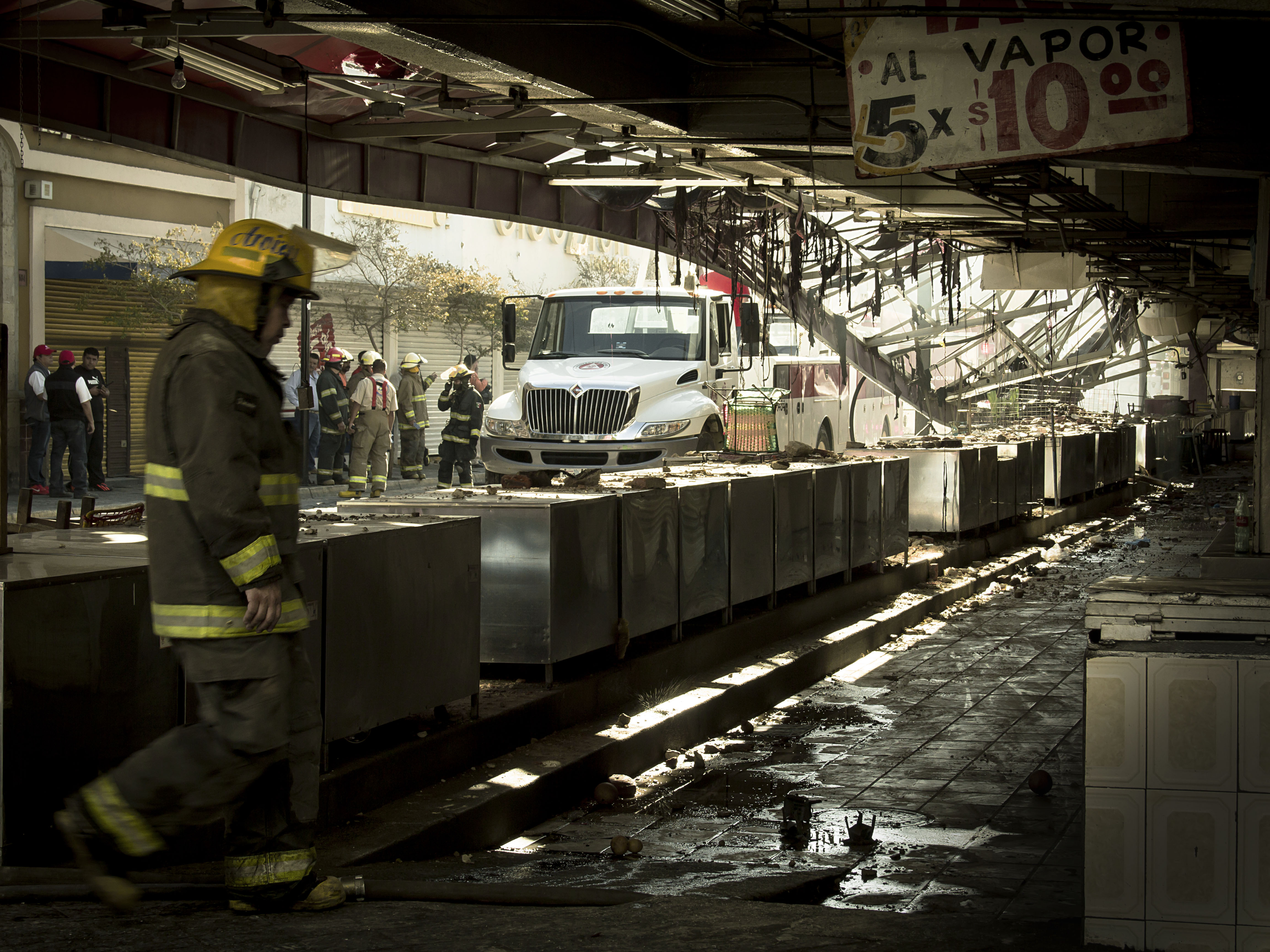 Parte afectada del Mercado Corona